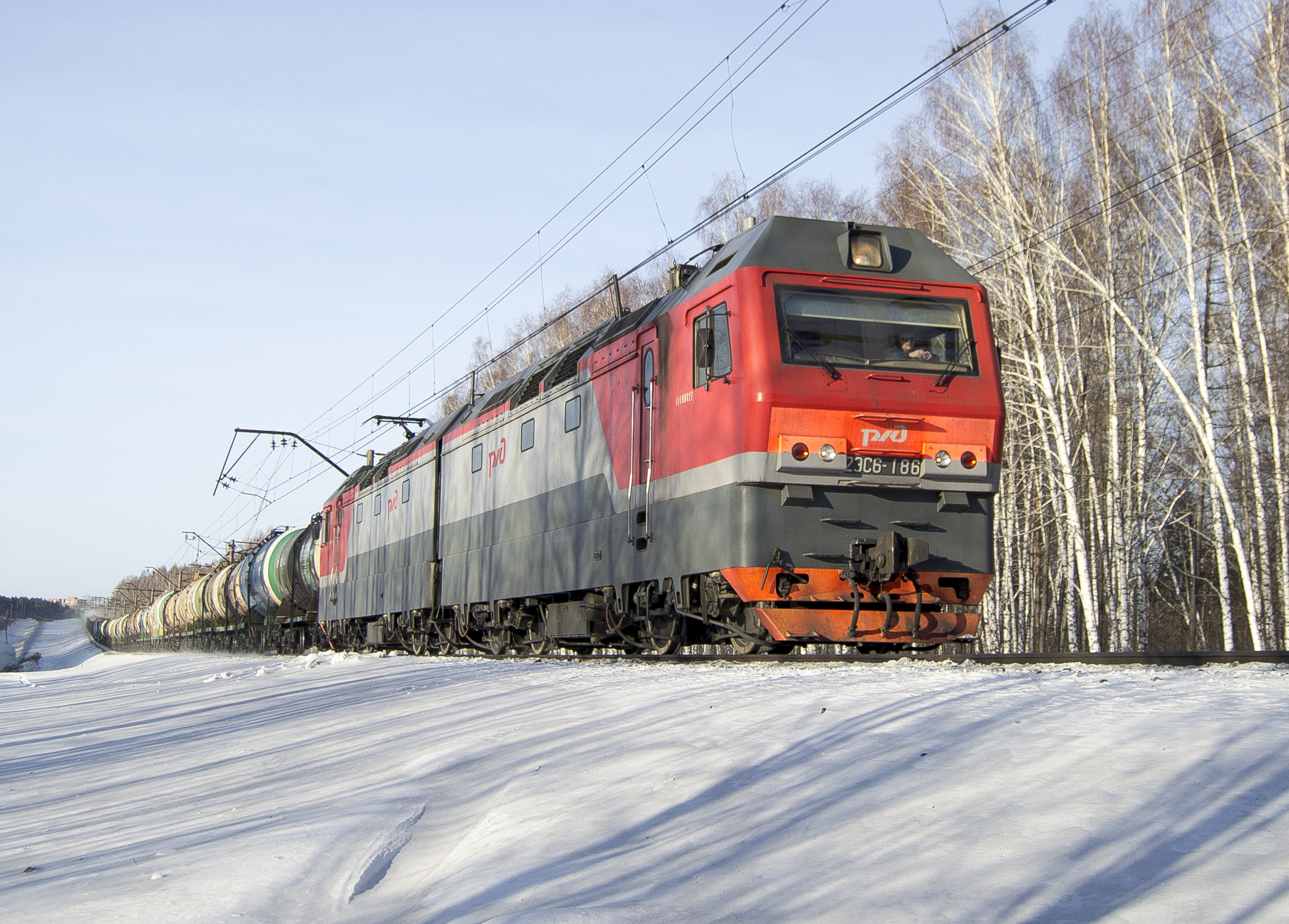 2ЭС6-186 на перегоне Томск-1 - Предтеченск. С начала зимы эти локомотивы стали часто заезжать и на Томскую ветку, хотя первый раз здесь их видели еще в апреле 2014 года